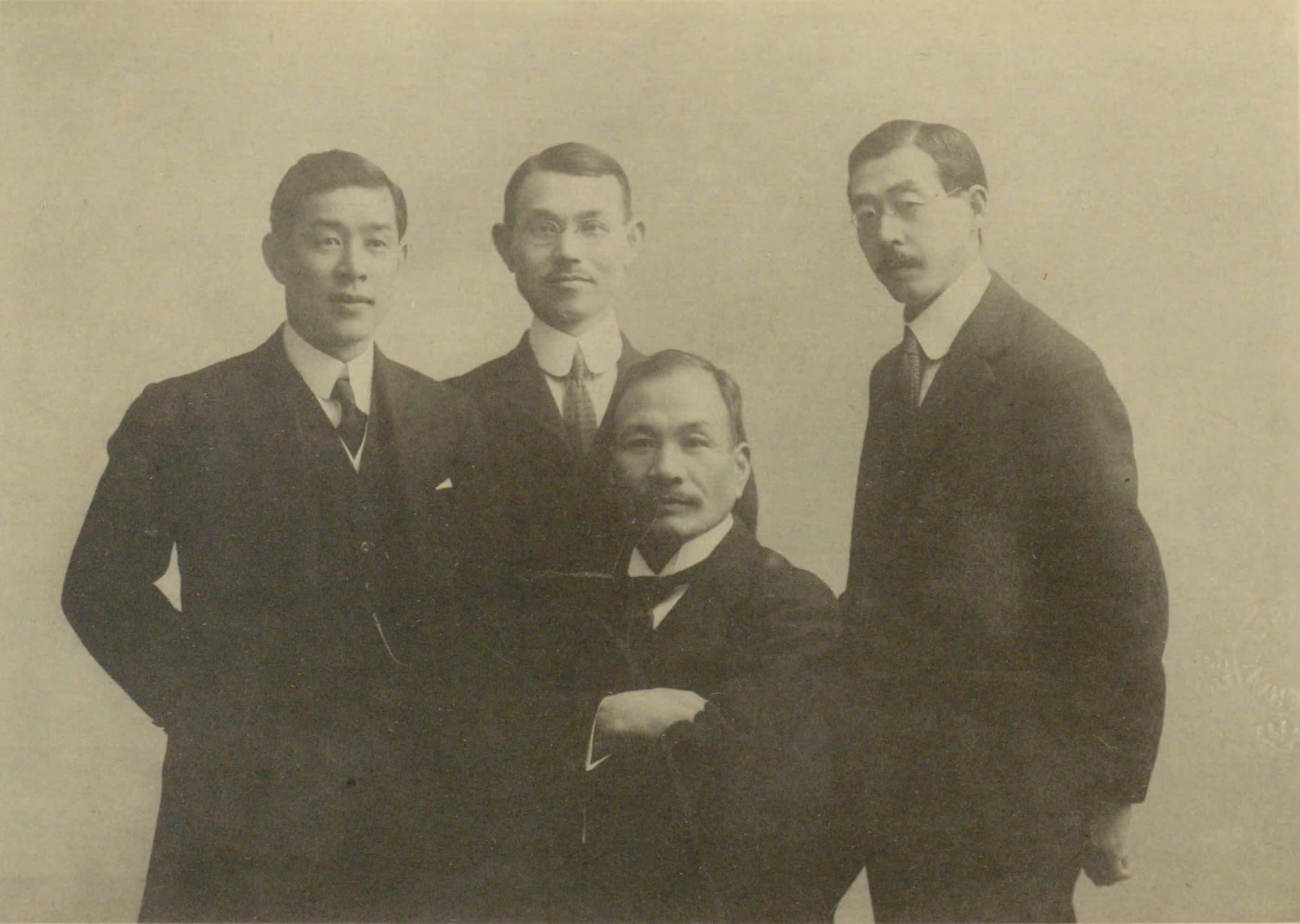 ヴェルサイユ講和会議に臨みたる時事新報関係者